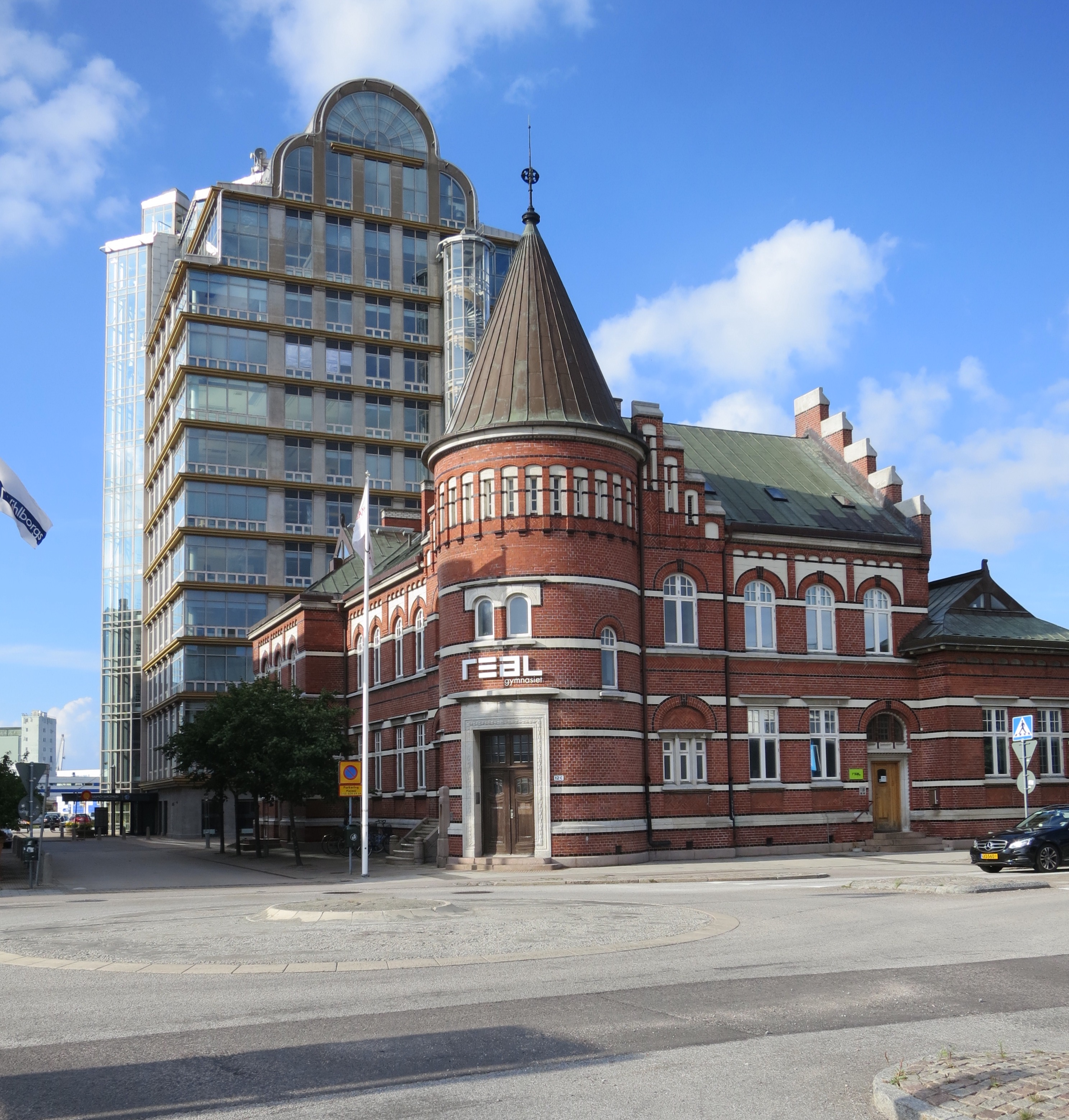 Slagthuset, Malmö